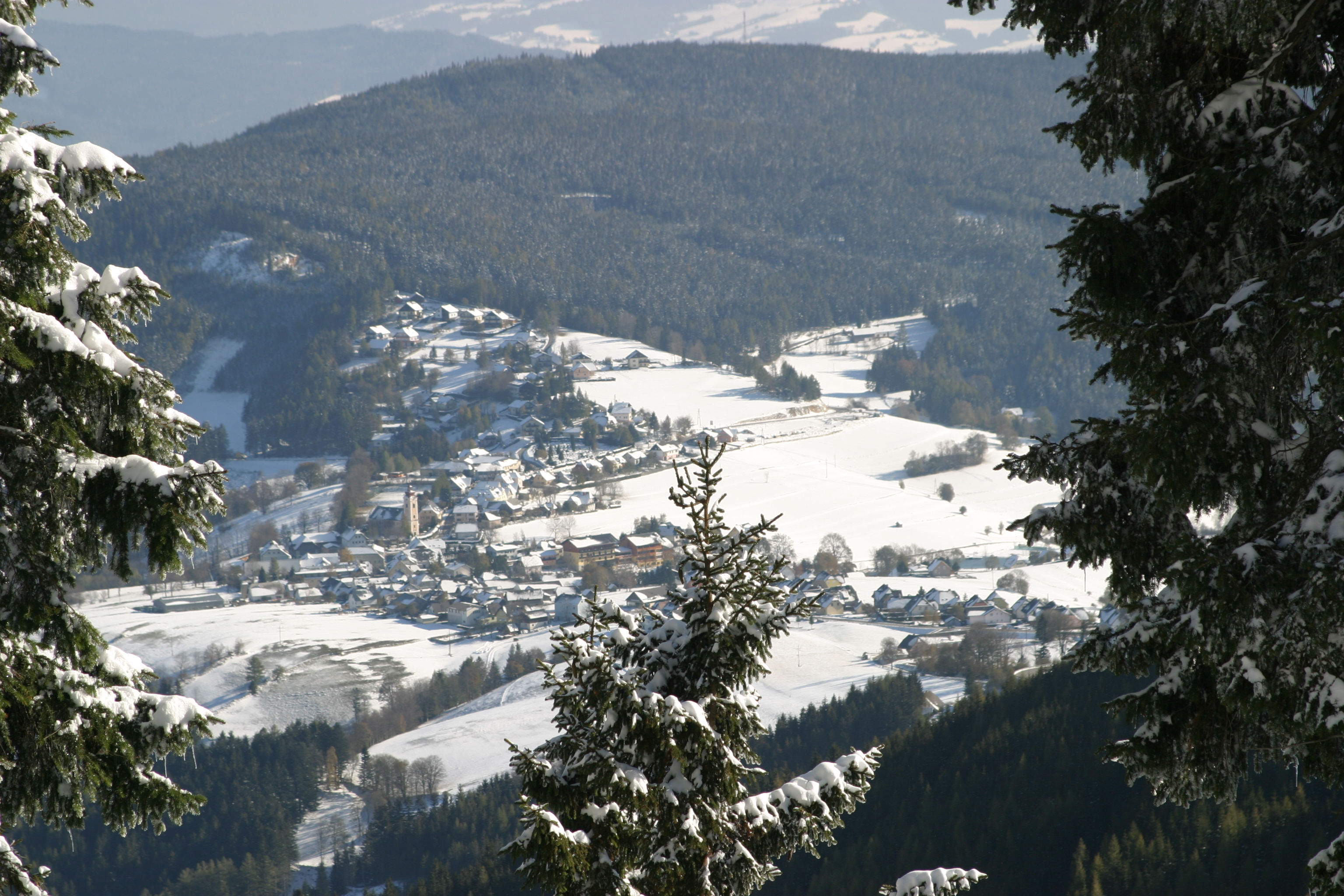 Fischbach vom Teufelstein aus gesehen